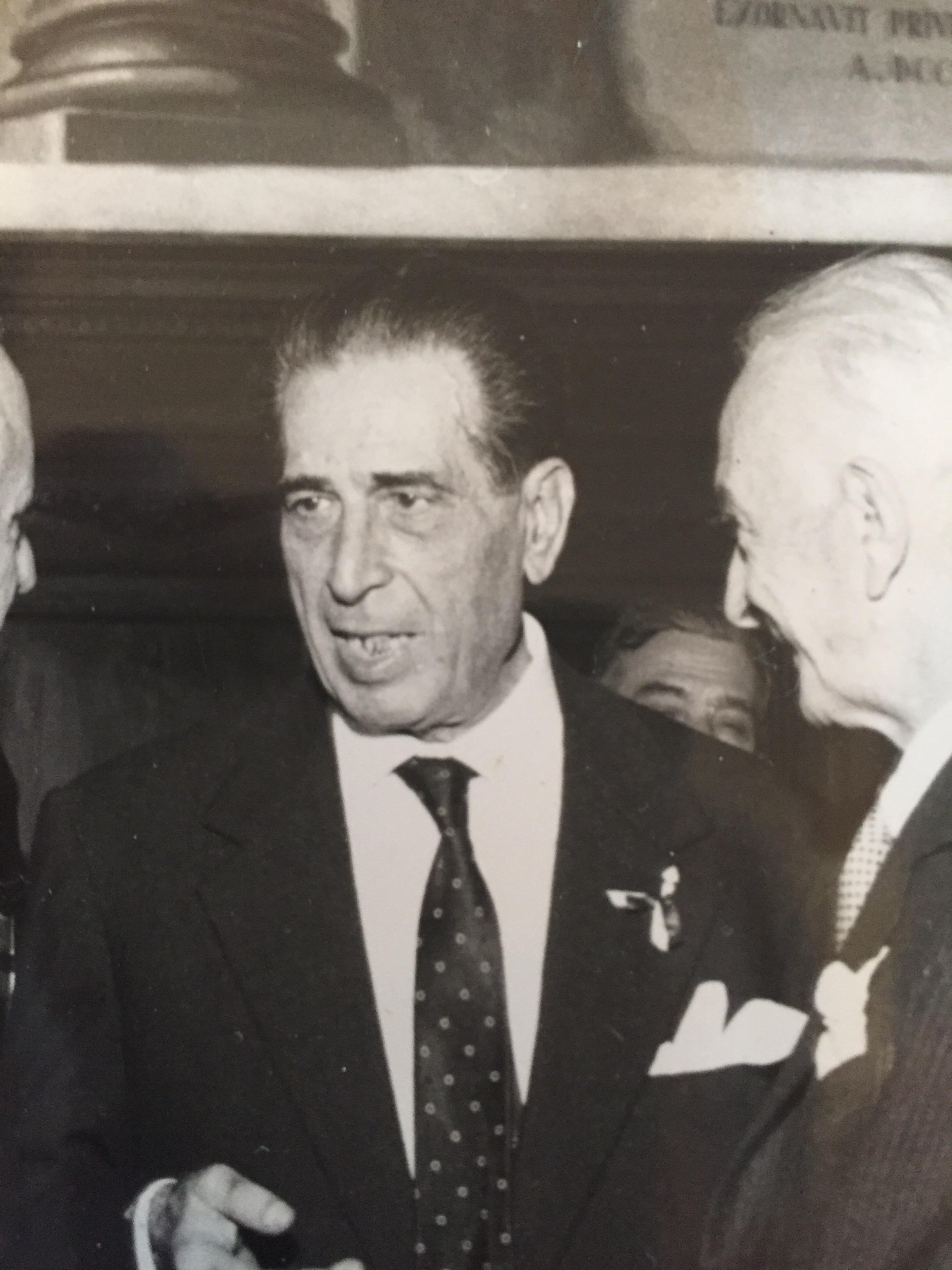 Il Dott. Sabatino Mele, con il Presidente della Repubblica Antonio Segni in visita a Viterbo nel 1964